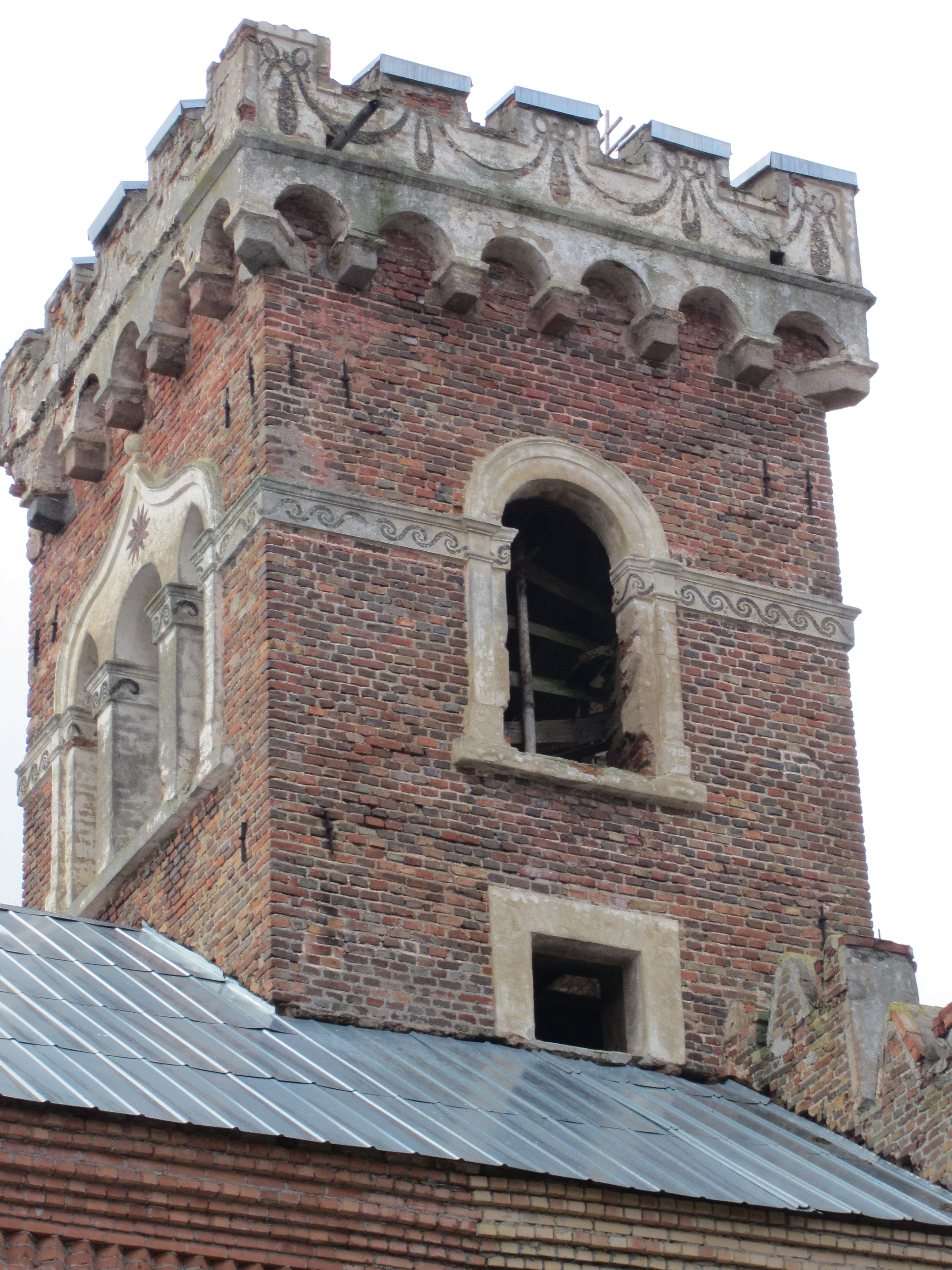 Беларуская (тарашкевіца): Царква Сьв. Барбары. в. Райца This is a photo of Belarusian heritage monument. Reference number: 413Г000323 ( WLM)